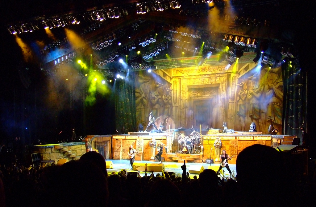 Gli Iron Maiden in una data del Somwhere Back In Time Tour 2008